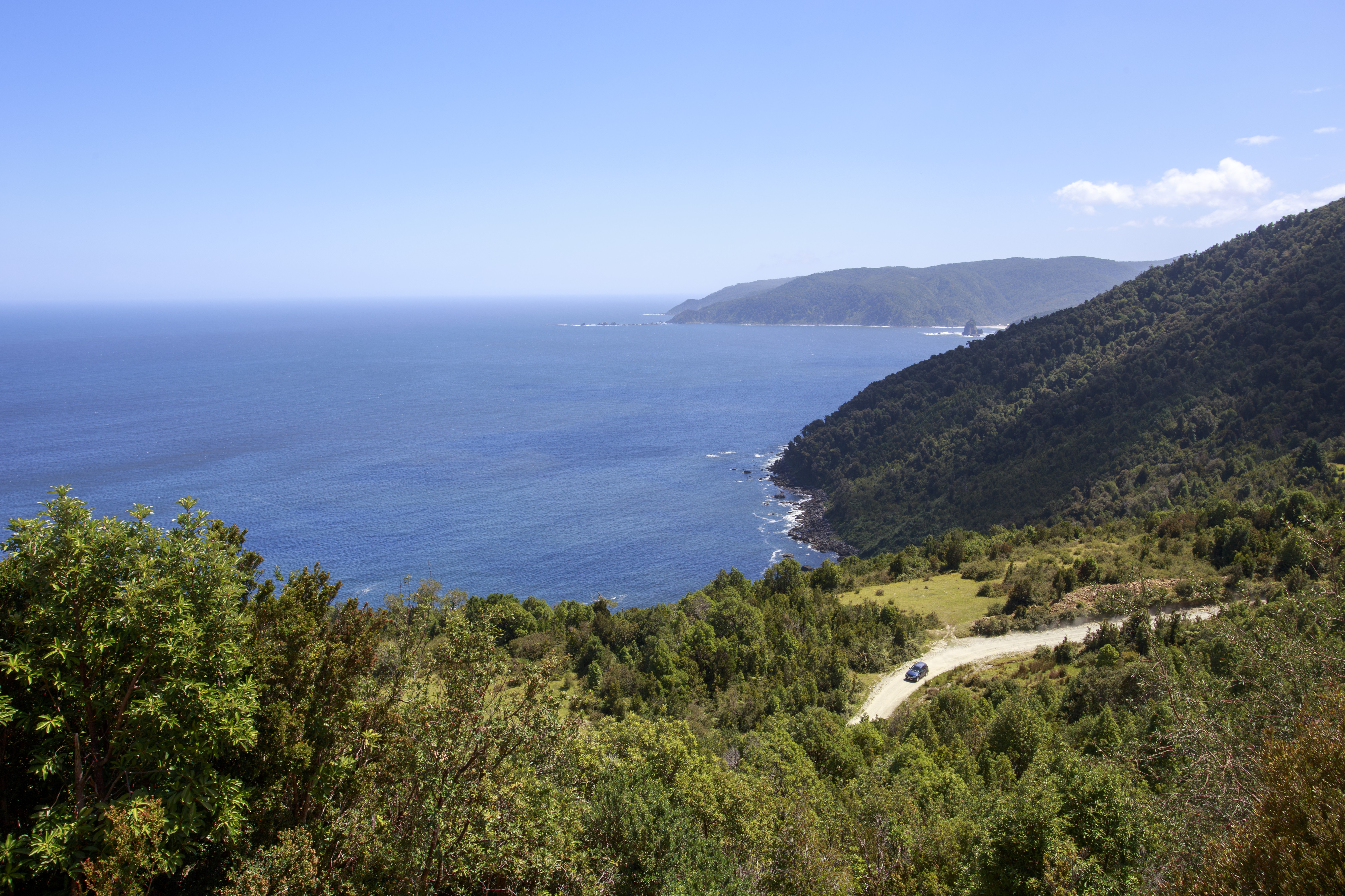 purranque bahía san pedro